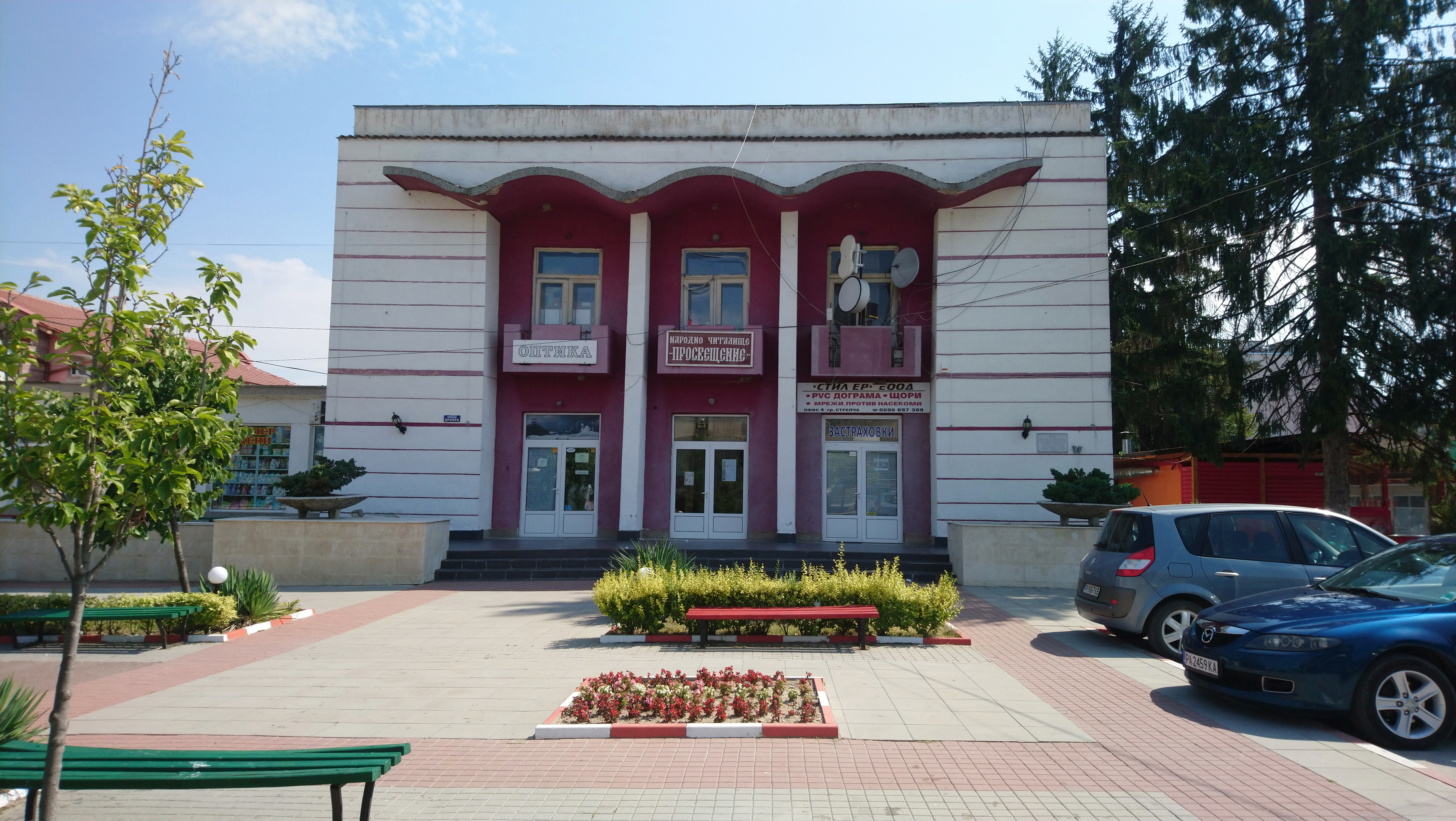 Читалище Просвещение 1871, град Стрелча